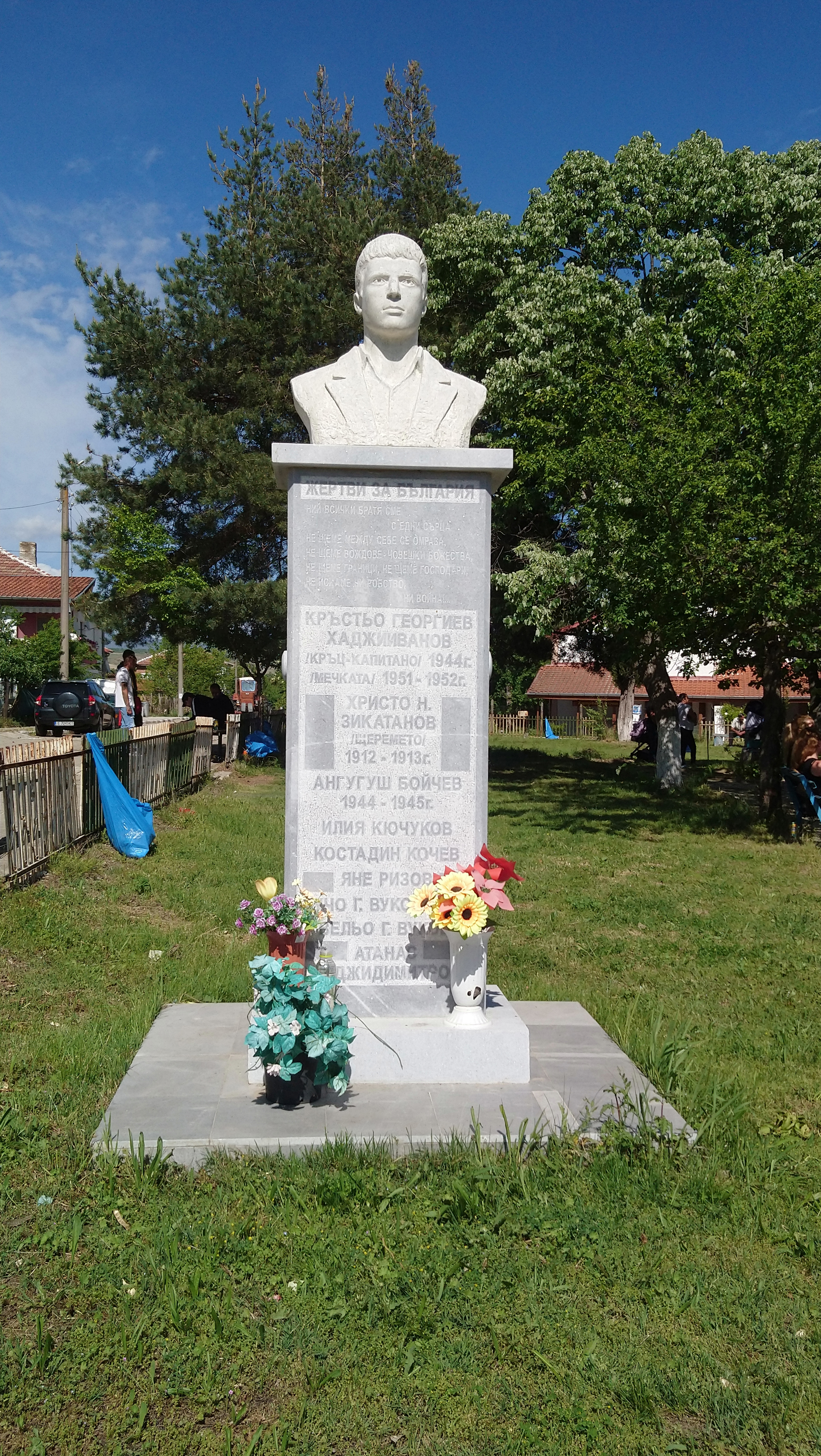 Паметник на Кръстьо Хаджииванов, село Капатово